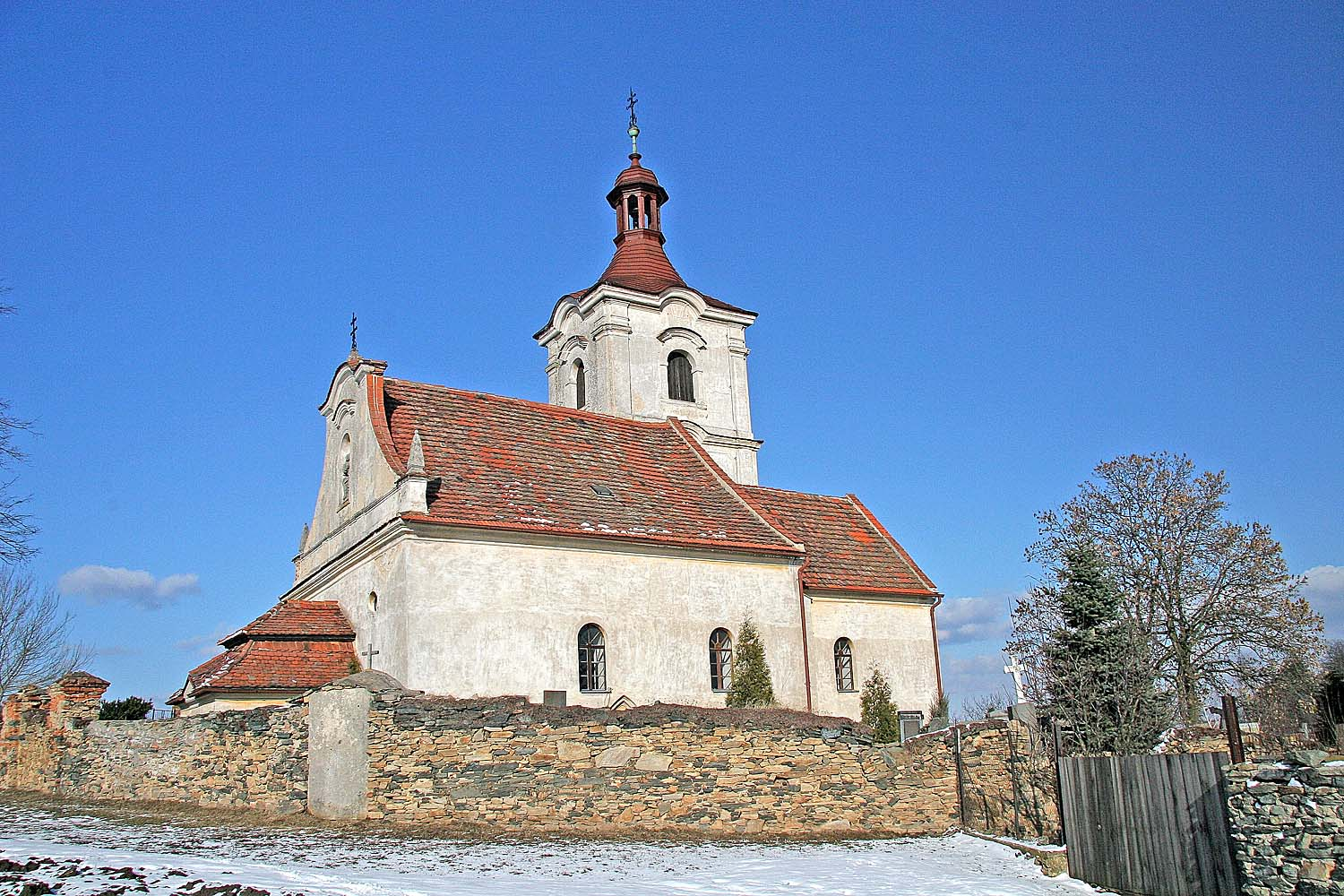 Polní Voděrady - kostel Navštívení Panny Marie, district Kolín autor: Prazak date: 27. 2. 2006